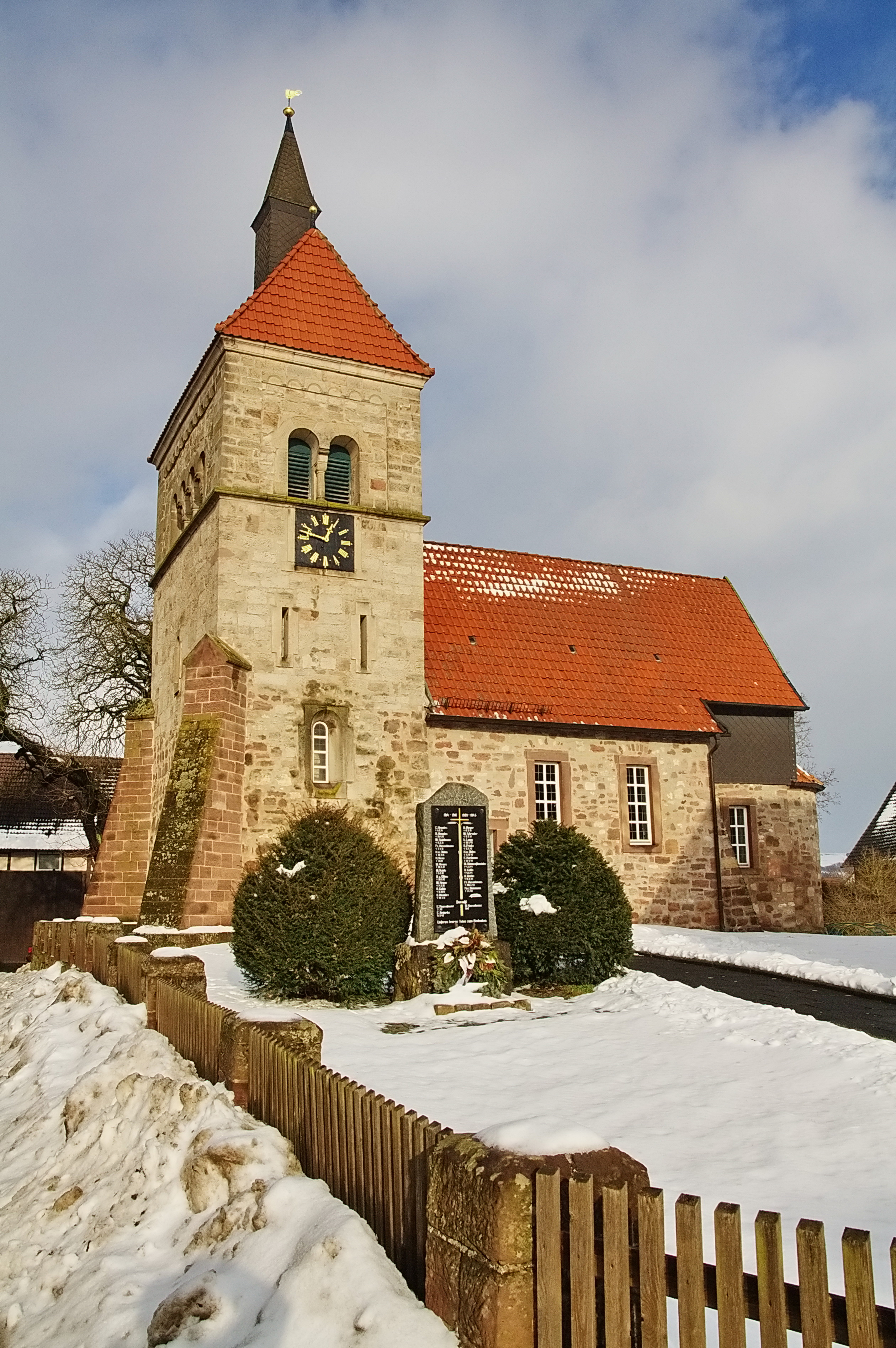 St. Johannis-Kirche in Kohnsen (Einbeck), Niedersachsen, Deutschland